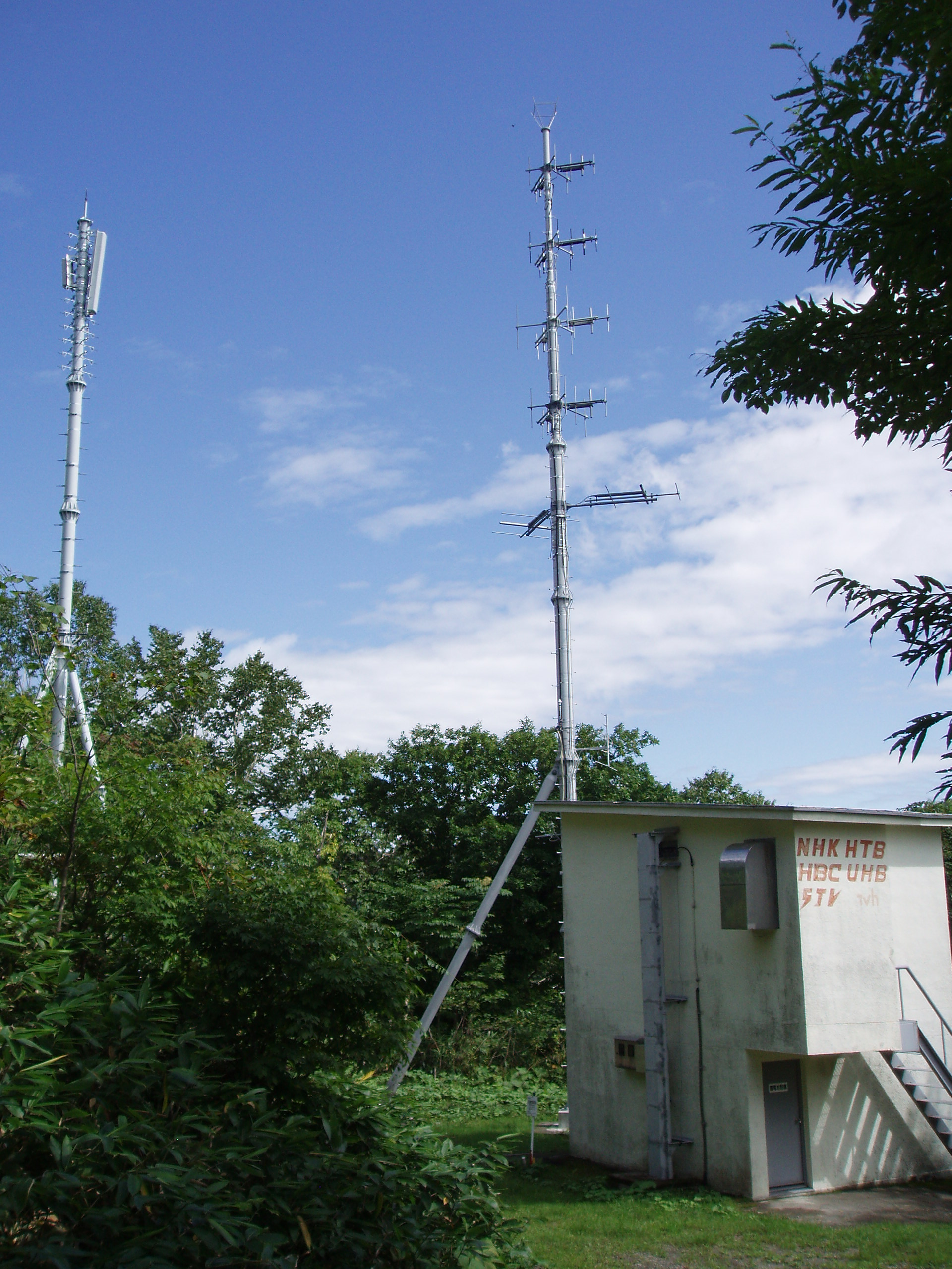 登別中継局